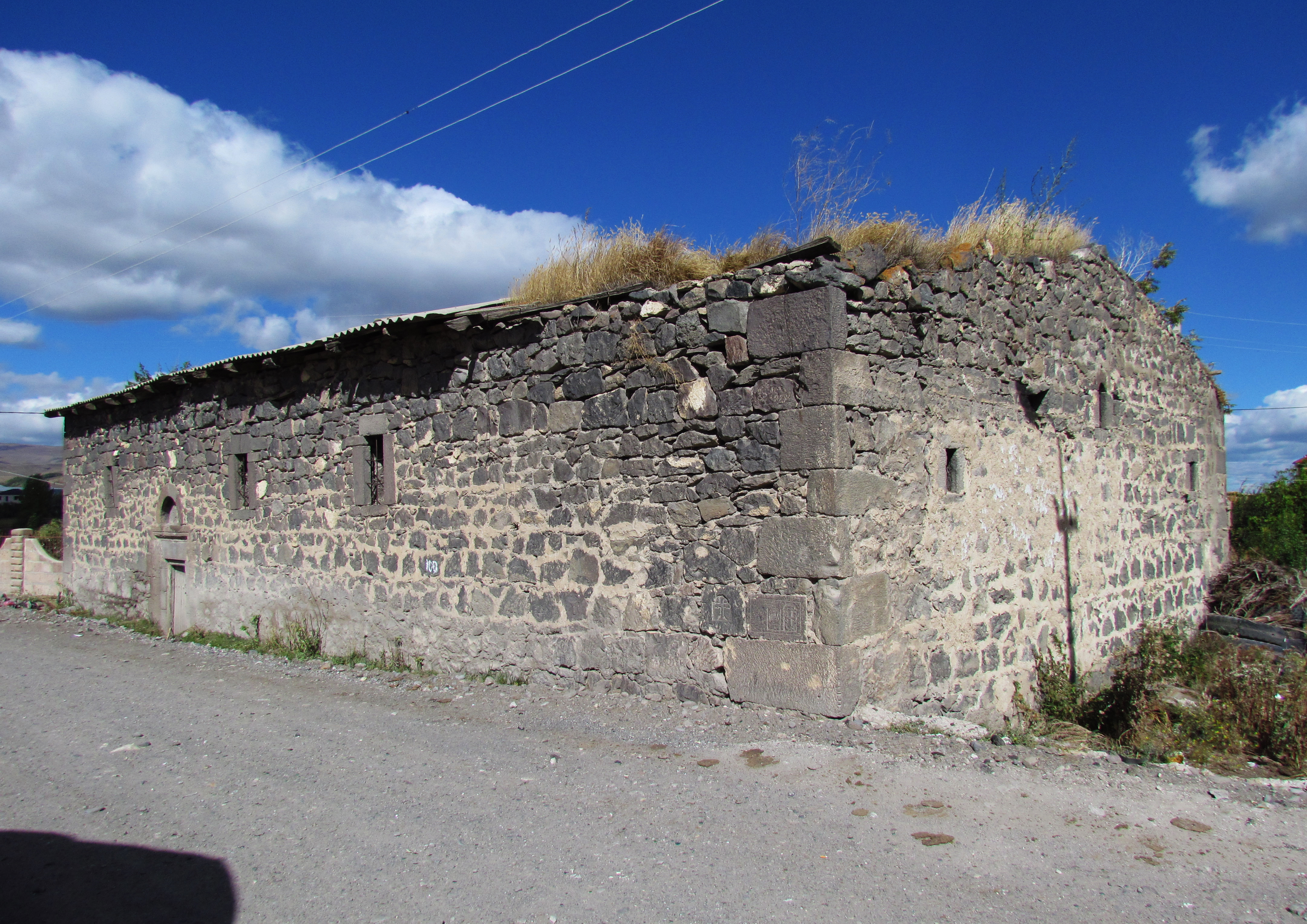 Եկեղեցին կառուցվել է 1878-84թթ. 45/2